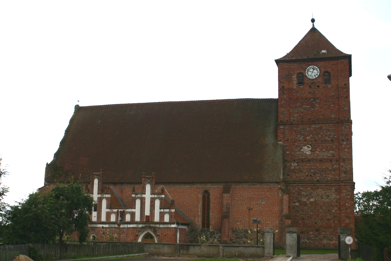 Barciany, Poland